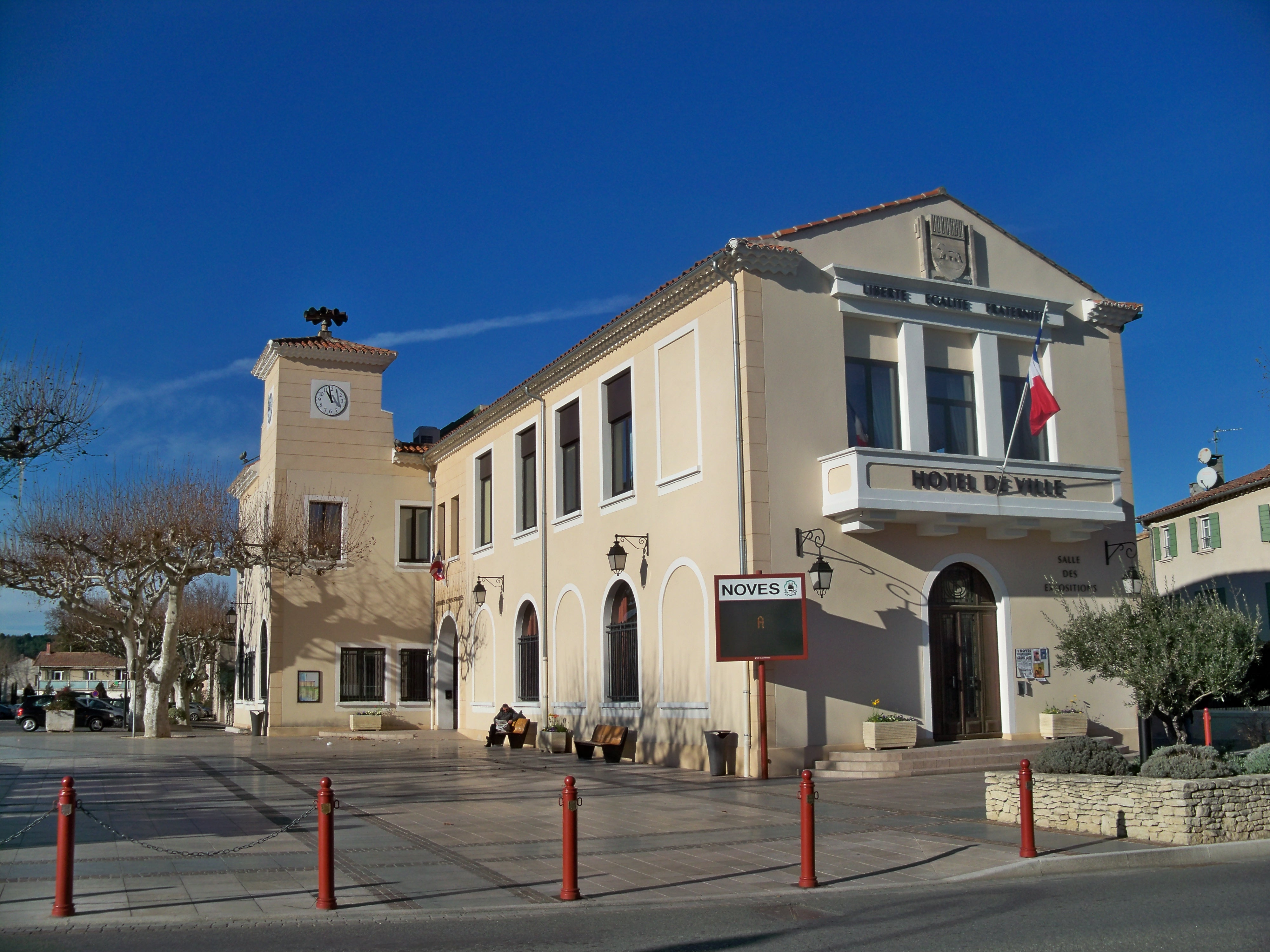 Mairie de Noves (13)